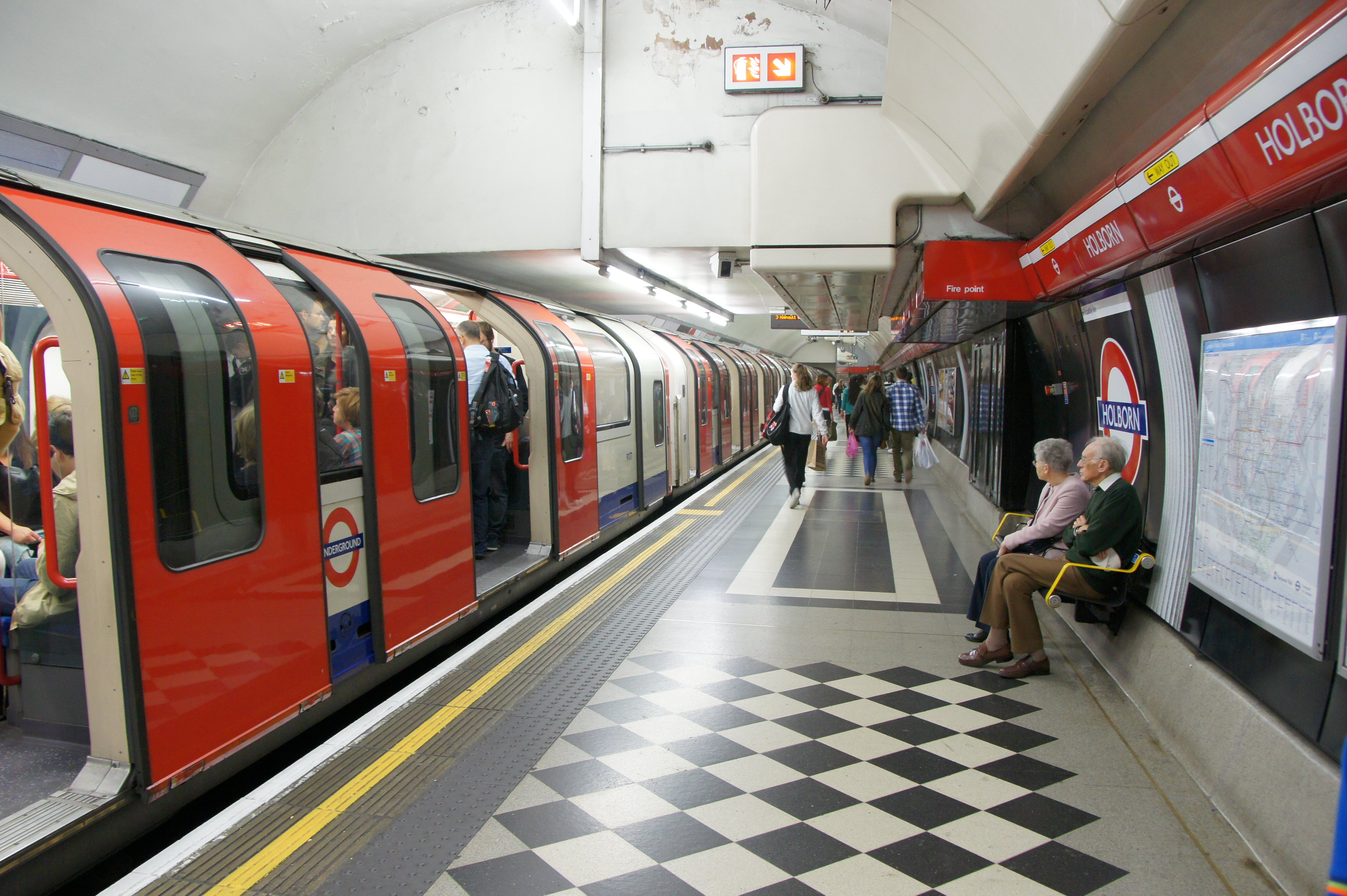 HOLBORN-3 230612 CPS